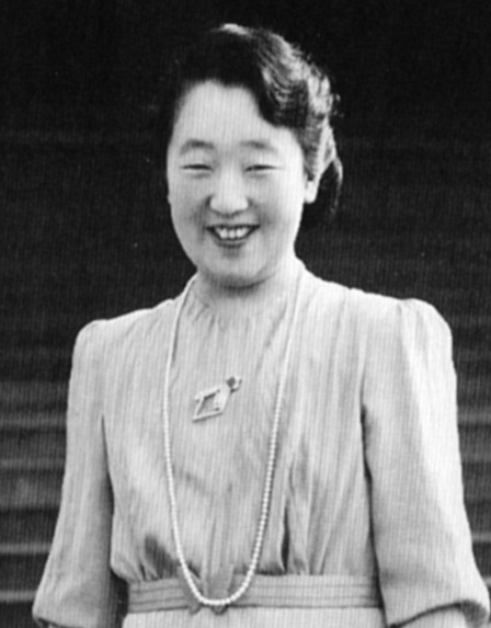 京都御所(Kyoto Imperial Palace)行啓の際の香淳皇后(Empress Kōjun)。全身写真より抜粋。当時38歳(38 years old)